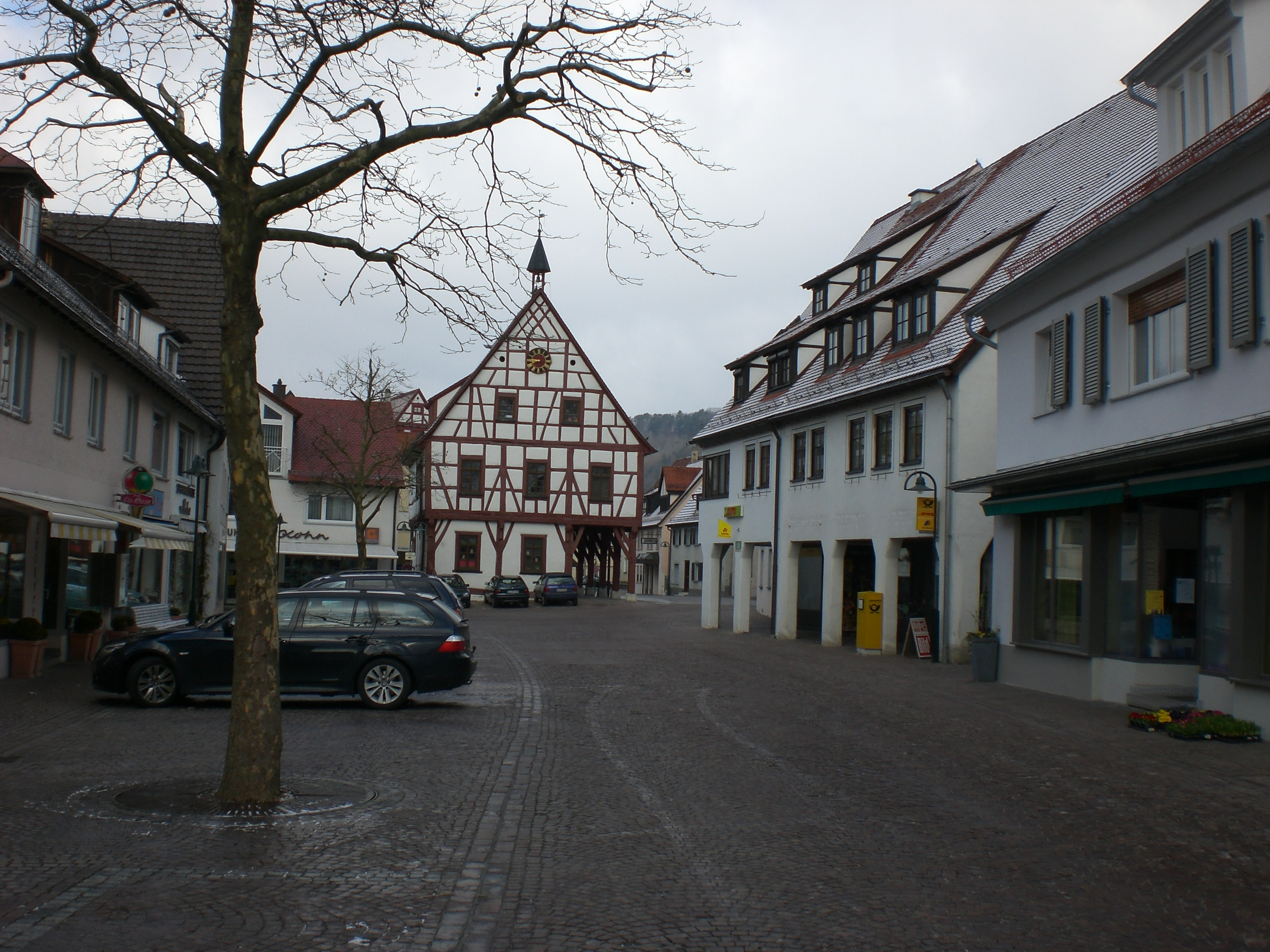 Marktstraße Schelklingen, Deutschland.